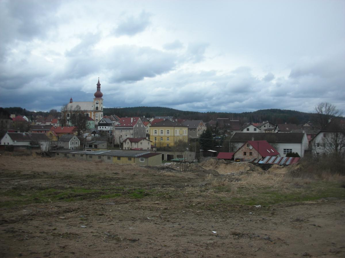 Skalná, im Vordergrund Baustelle für viele Eigenheime